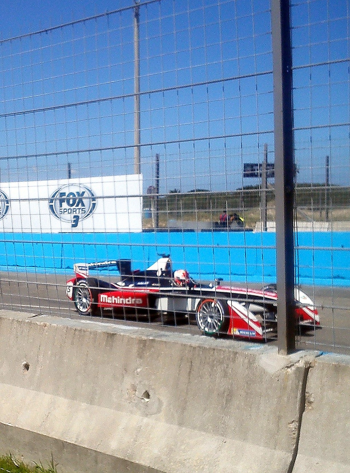 Karun Chandhok en el ePrix de Punta del Este del 2014, fecha valida por la Formula E.